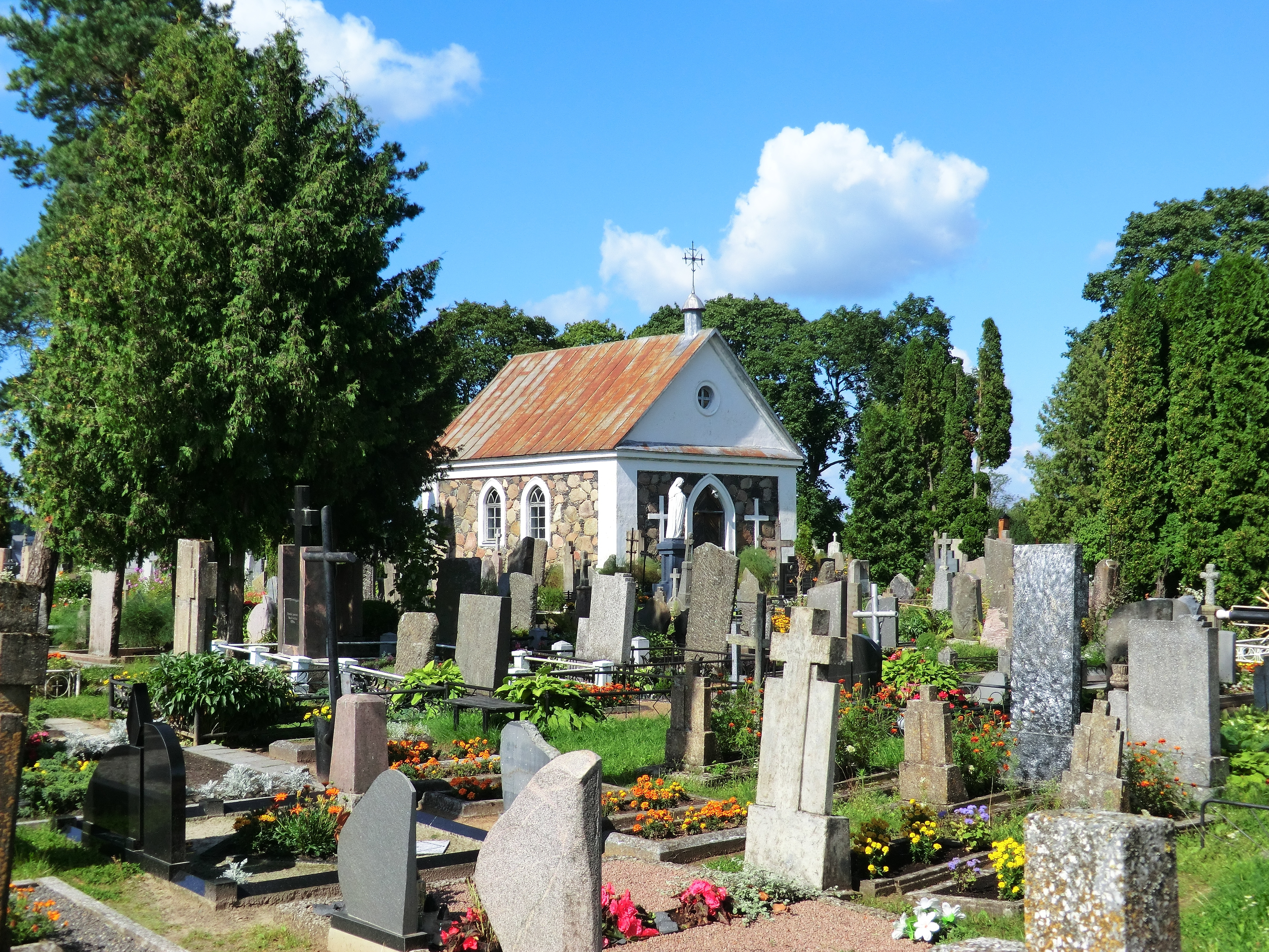 Svėdasai, Lithuania